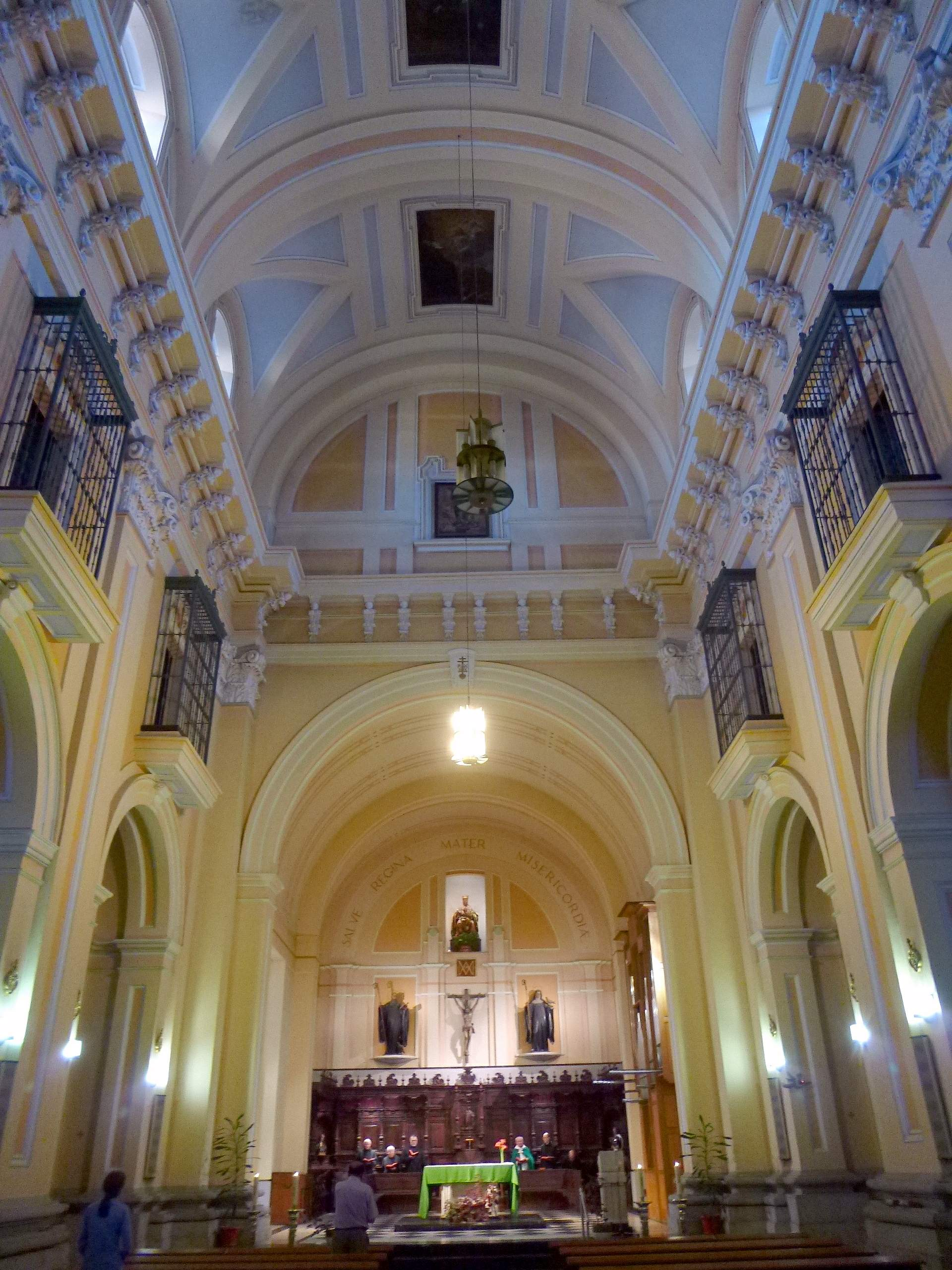 Iglesia de Nuestra Señora de Montserrat (PP Benedictinos), en Madrid.